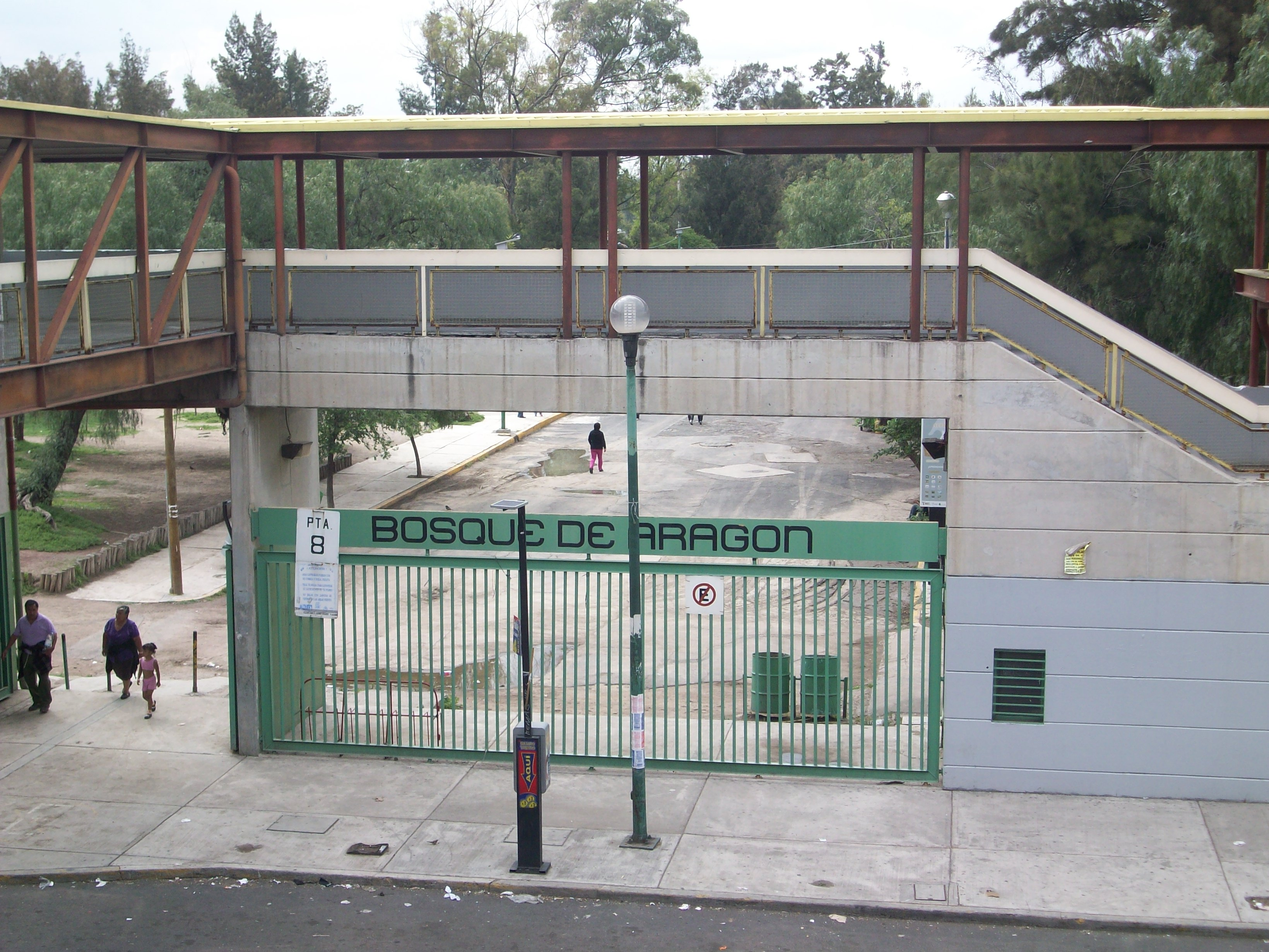 Acceso 8 al bosque de Aragón por la estacion Bsque de Aragón